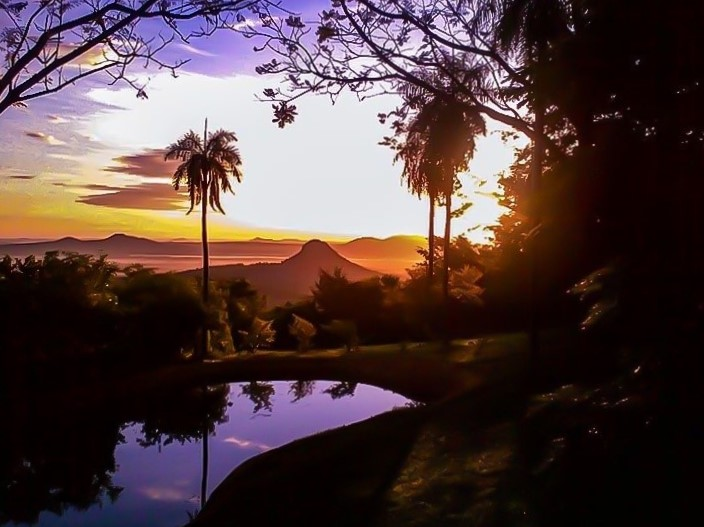 Reserva Ecológica Turística MBATOVI en Paraguay